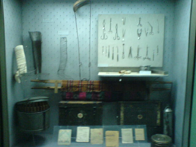 Oprema partizanskih bolnica